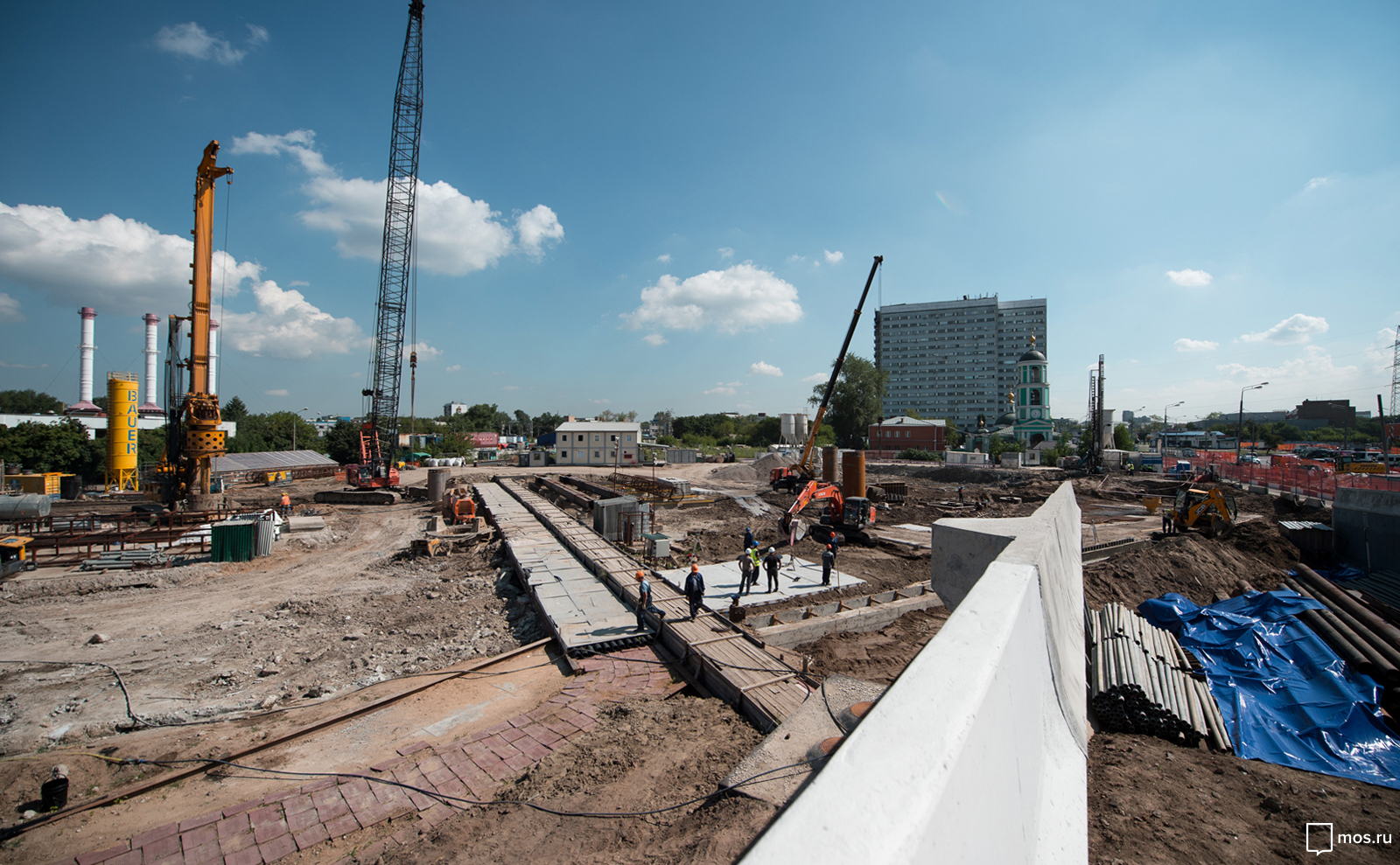 Строительство станции «Нижегородская улица» Кожуховской линии метро (август 2016 года).